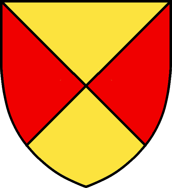 Fyrstyckad vapensköld för Ivar Nilssons ätt